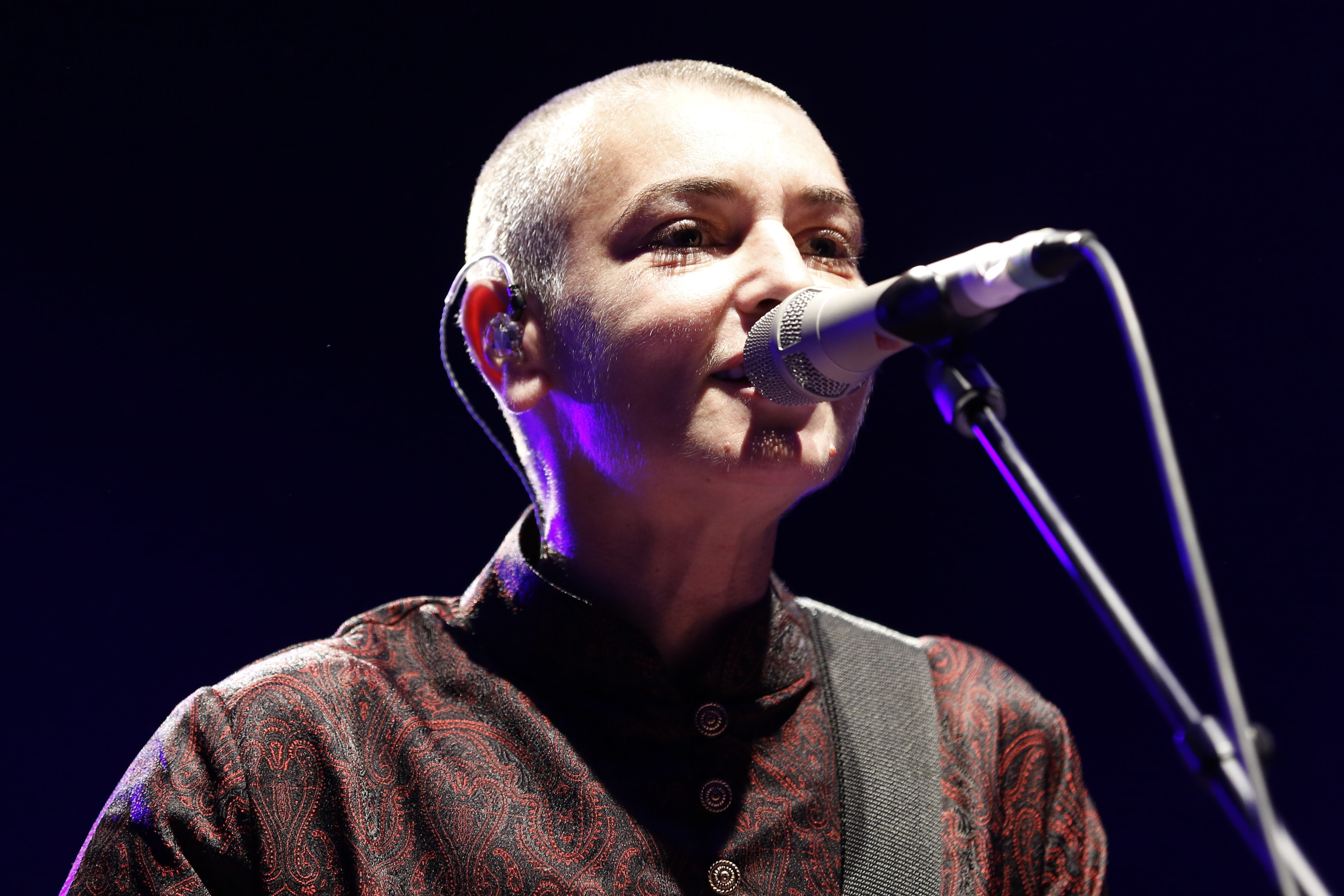 Sinéad O'Connor lors du Festival interceltique de Lorient, le 10 août 2013.